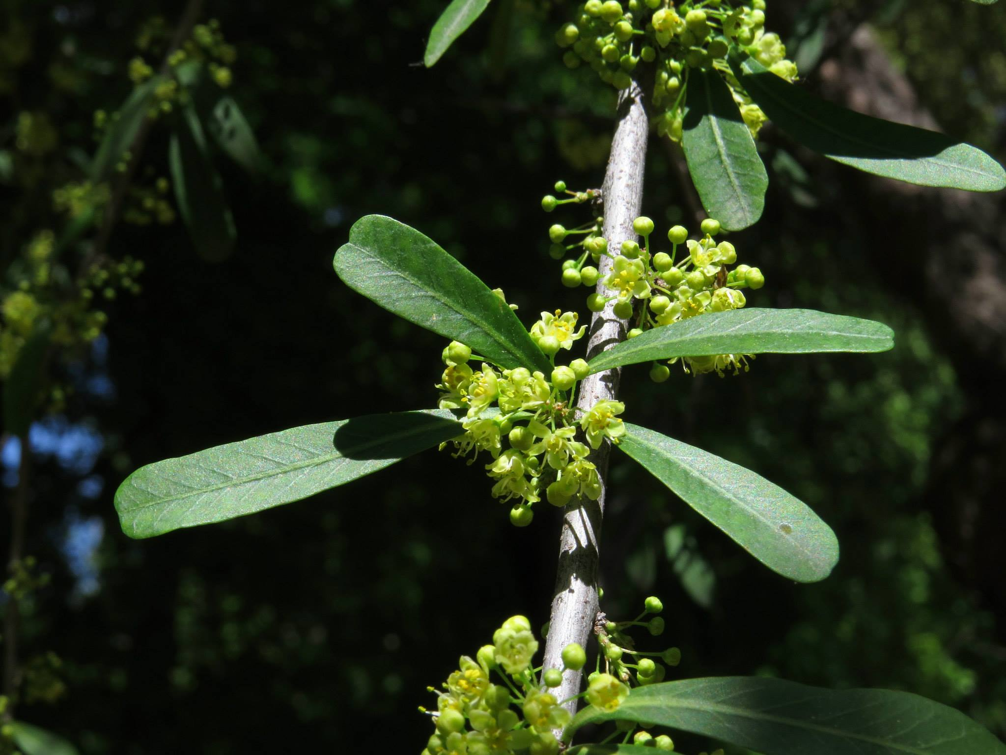 Rama florida de Schinus polygamus (Anacardiaceae). Real Jardín Botánico de Madrid.